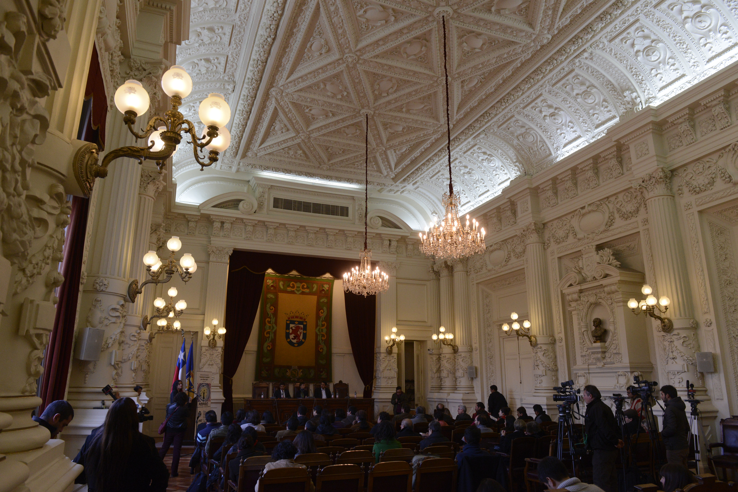 26/05/15 Ministro Marcelo Diaz asiste a la inauguración del seminario Comunicación Comunitaria en el salón de Honor de la Municipalidad de Santiago.